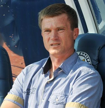 Юрій Максимов - український футболіст і тренер. Під час тренерства Металург (Донецьк)